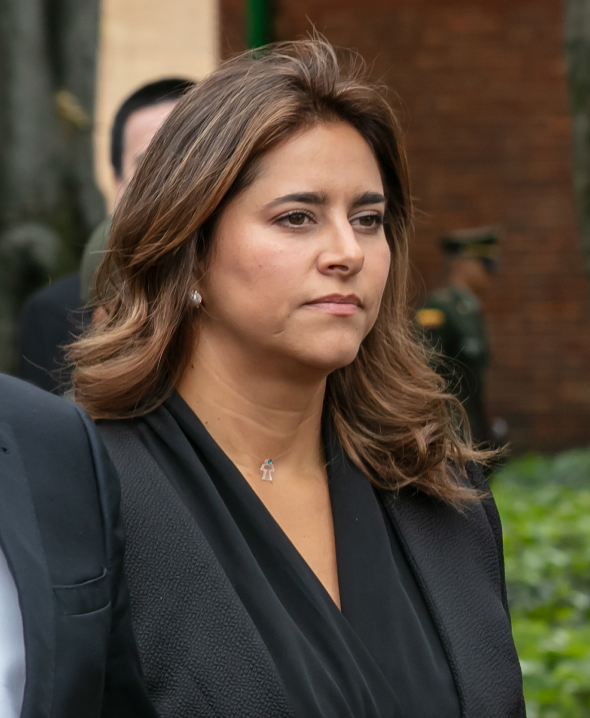 2020 María Juliana Ruiz, Primera Dama de Colombia